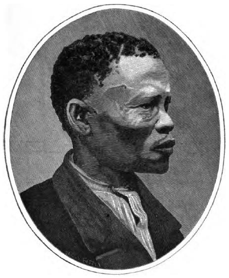 Jan Jonker Afrikaner (* 1820 in Windhuk, Südwestafrika; † 10. August 1889 bei Tsoabis, Südwestafrika)